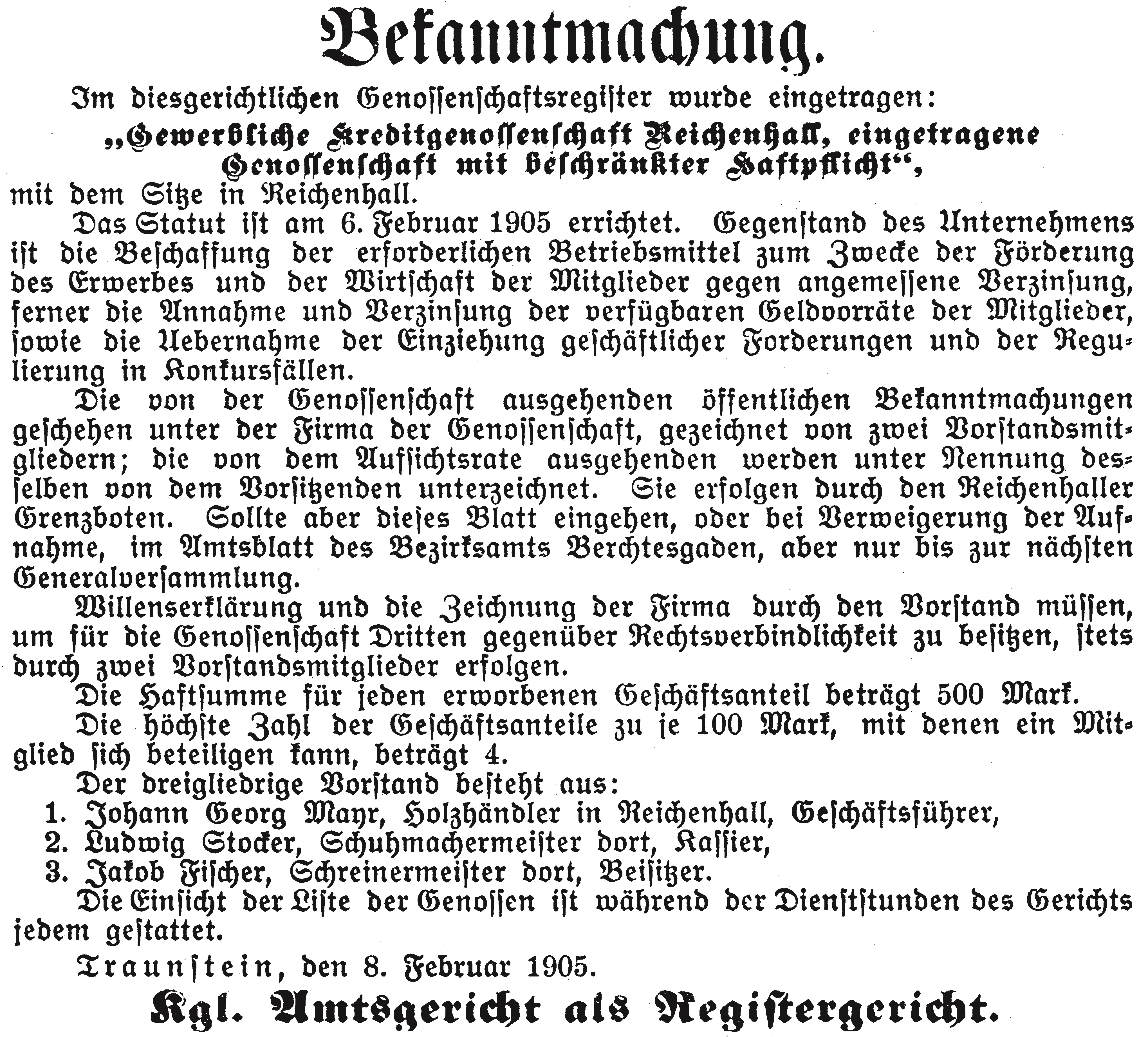 Bekanntmachung der Eintragung der gewerblichen Kreditgenossenschaft Bad Reichenhall in das Registergericht.